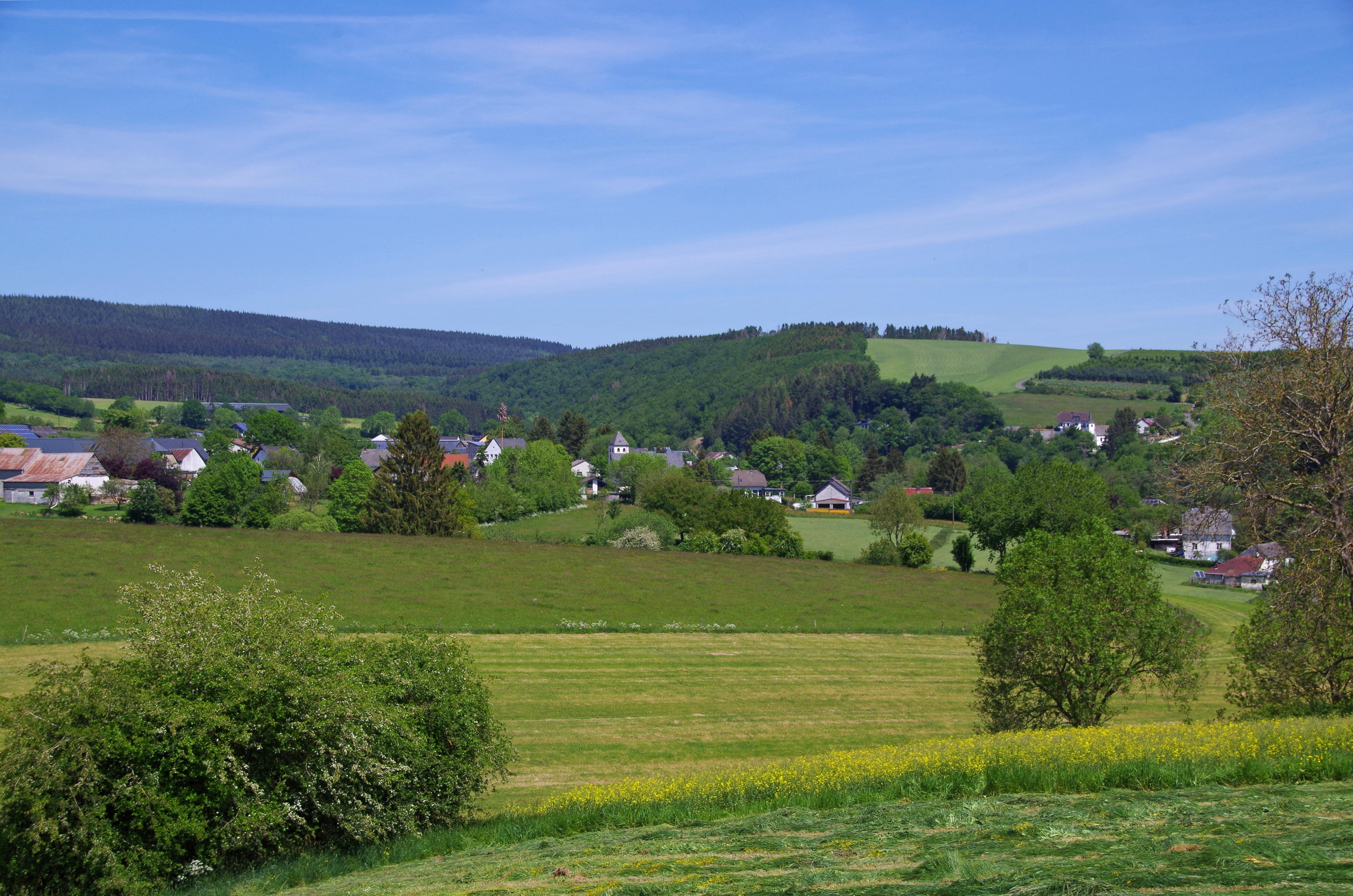 Sellerich